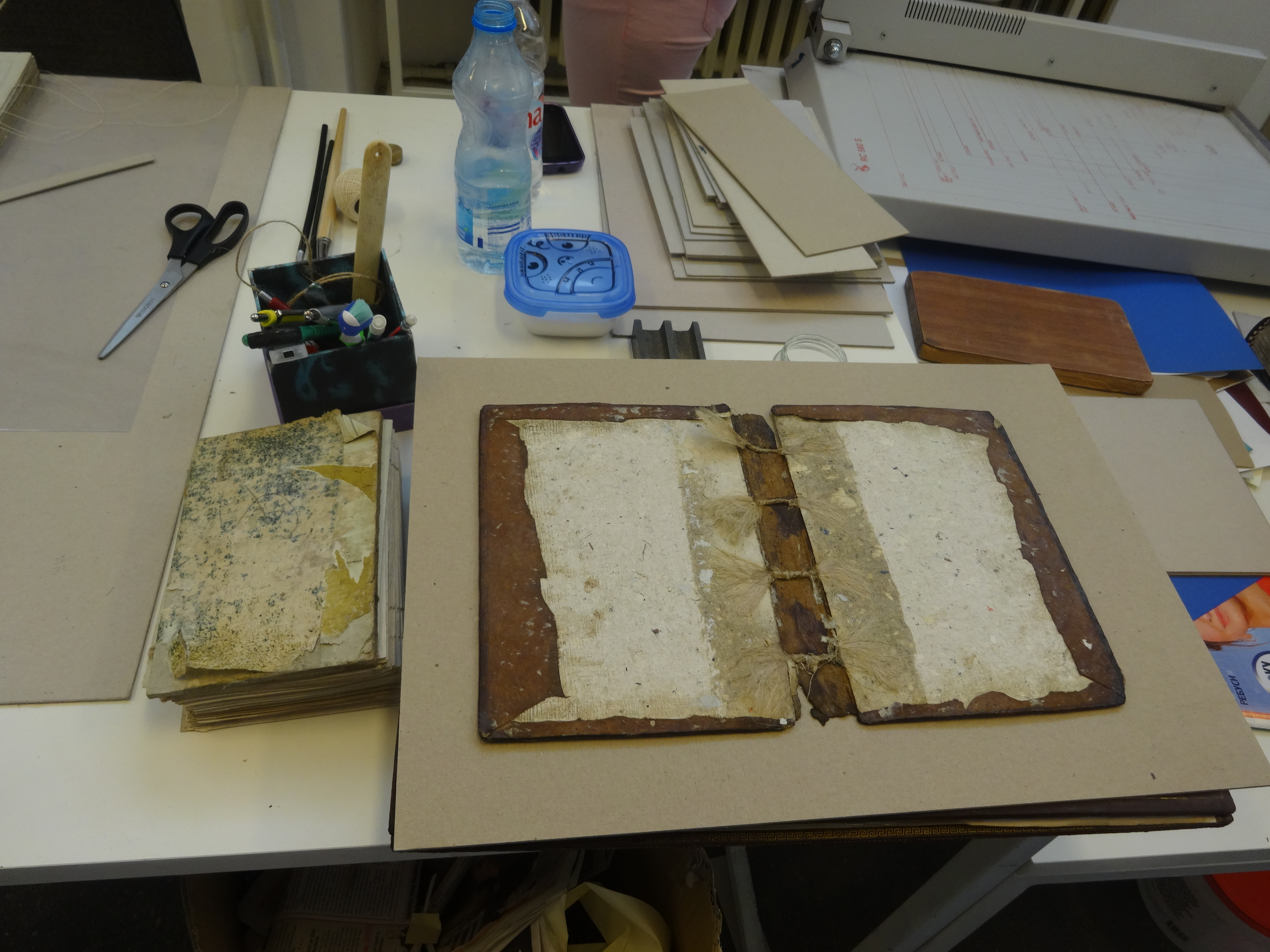 This media file is allowed by the National Library of Serbia.